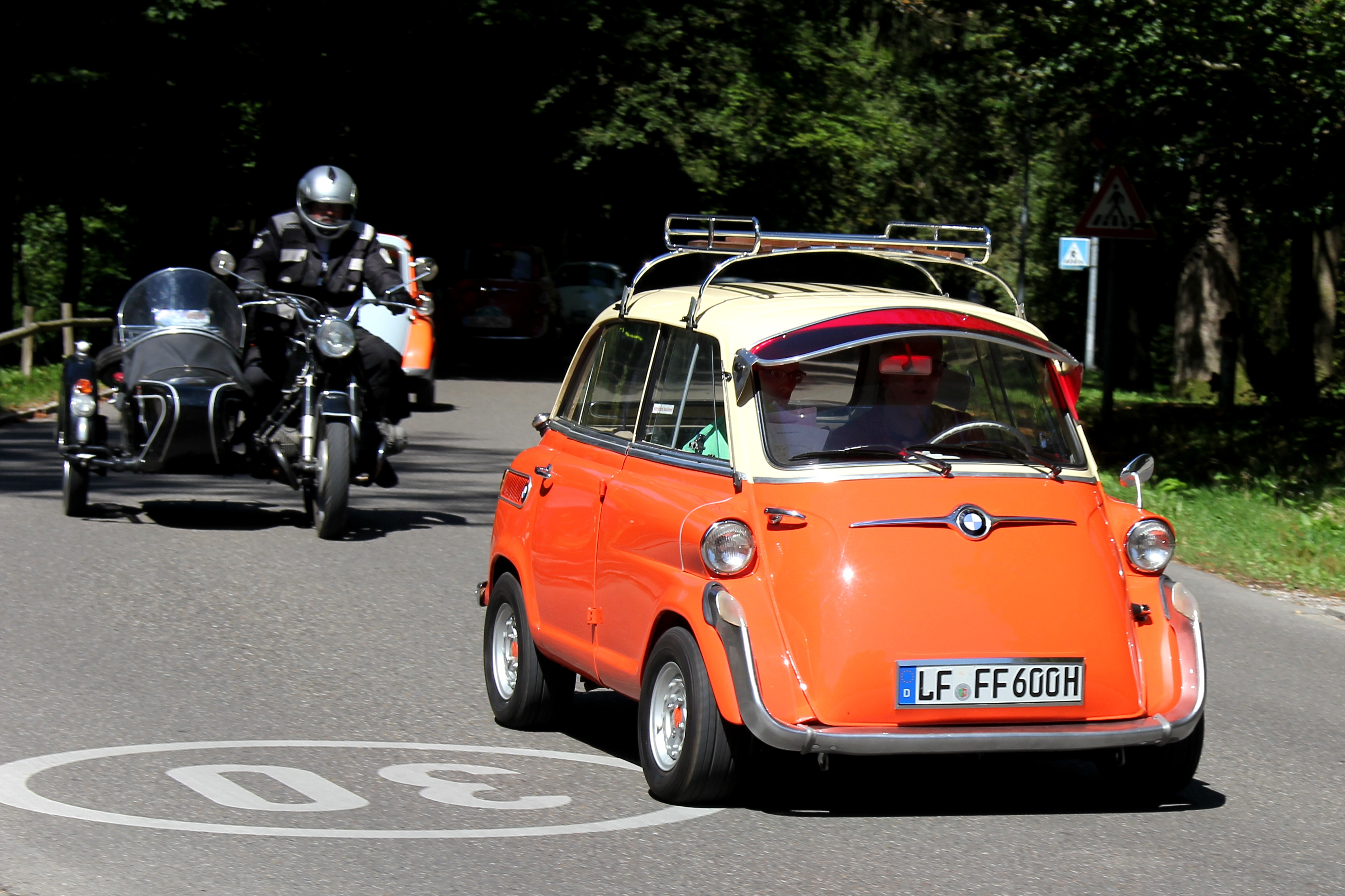 BMW BMW 600 mit Dachgepäckträger beim BMW-Isetta-Treffen in Bad Wörishofen (Kennzeichen des Fahrzeugs verfälscht)